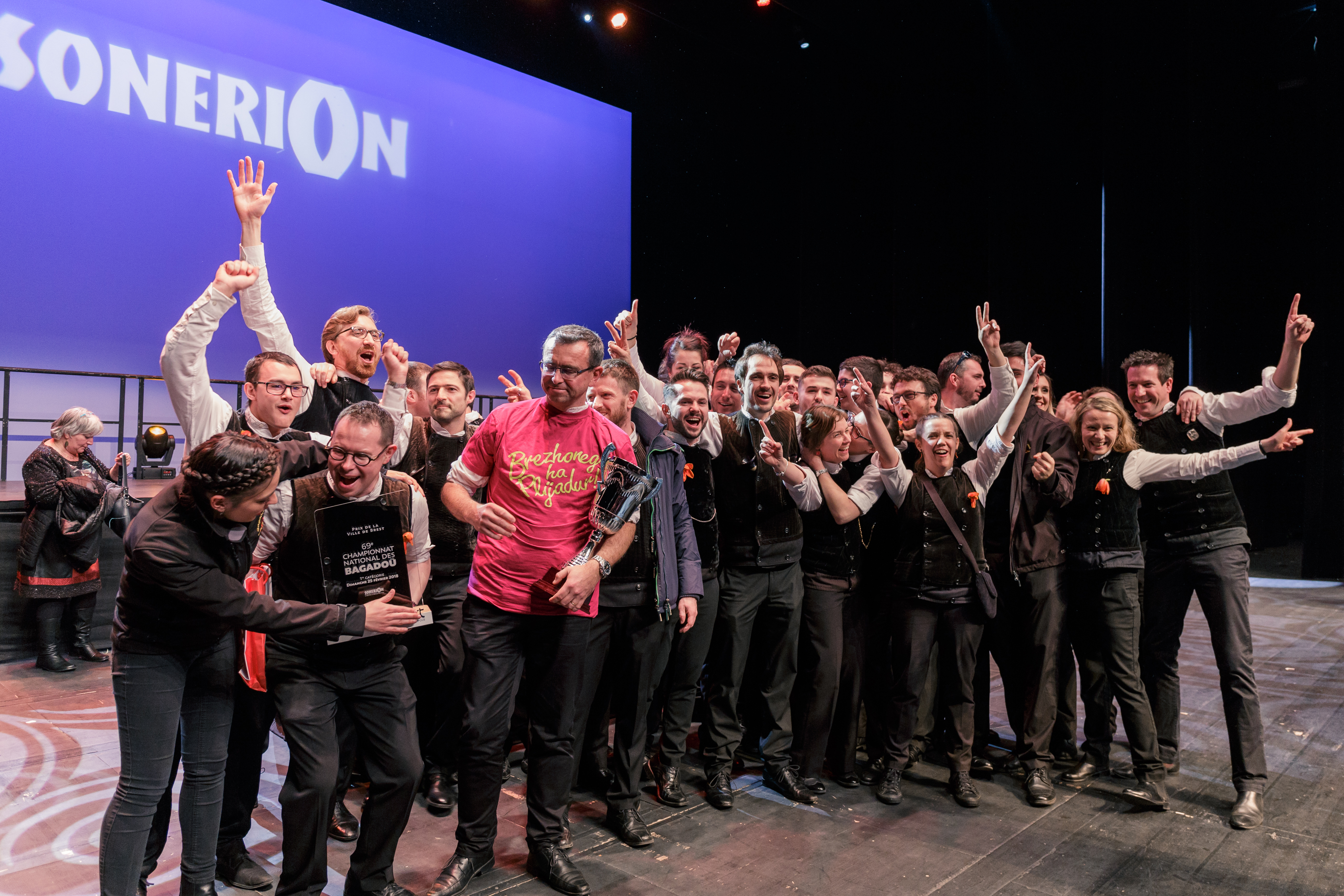 Annonce des résultats et remise des prix de la première manche du Championnat national des bagadoù de Première catégorie au Quartz à Brest le 25 février 2018.